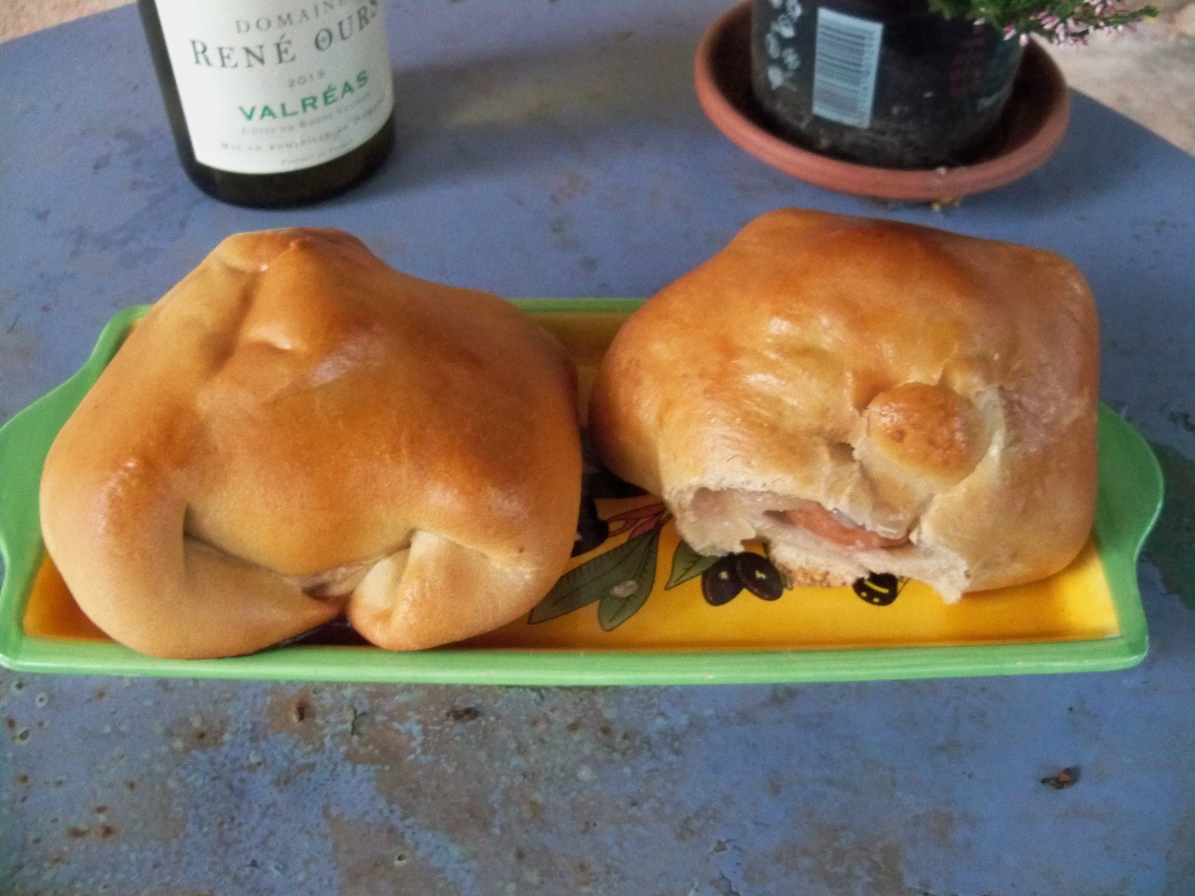 Pain coing, spécialité provençale à base de coing entier